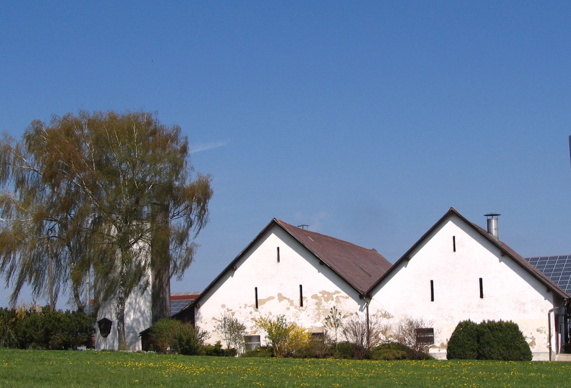 Einöde Schillhof in Abensberg, Landkreis Kelheim, Niederbayern